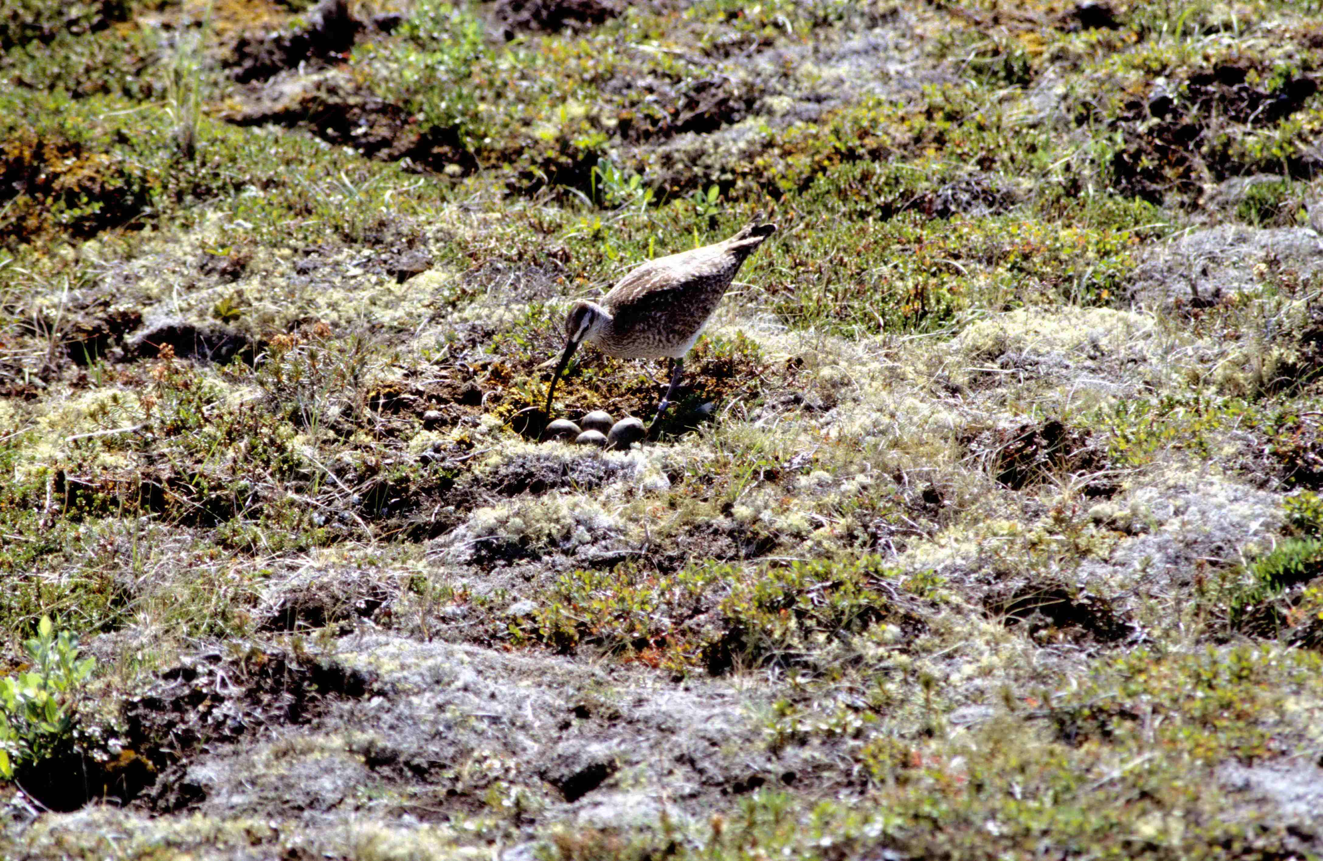 Whimbrel at nest (Wapusk National Park, Manitoba, Canada)